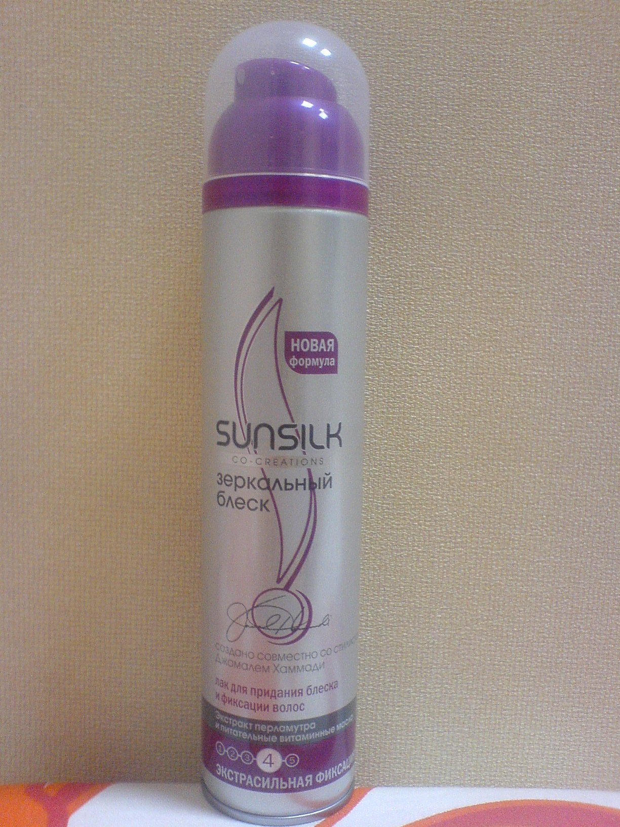 лак для волос Sunslik